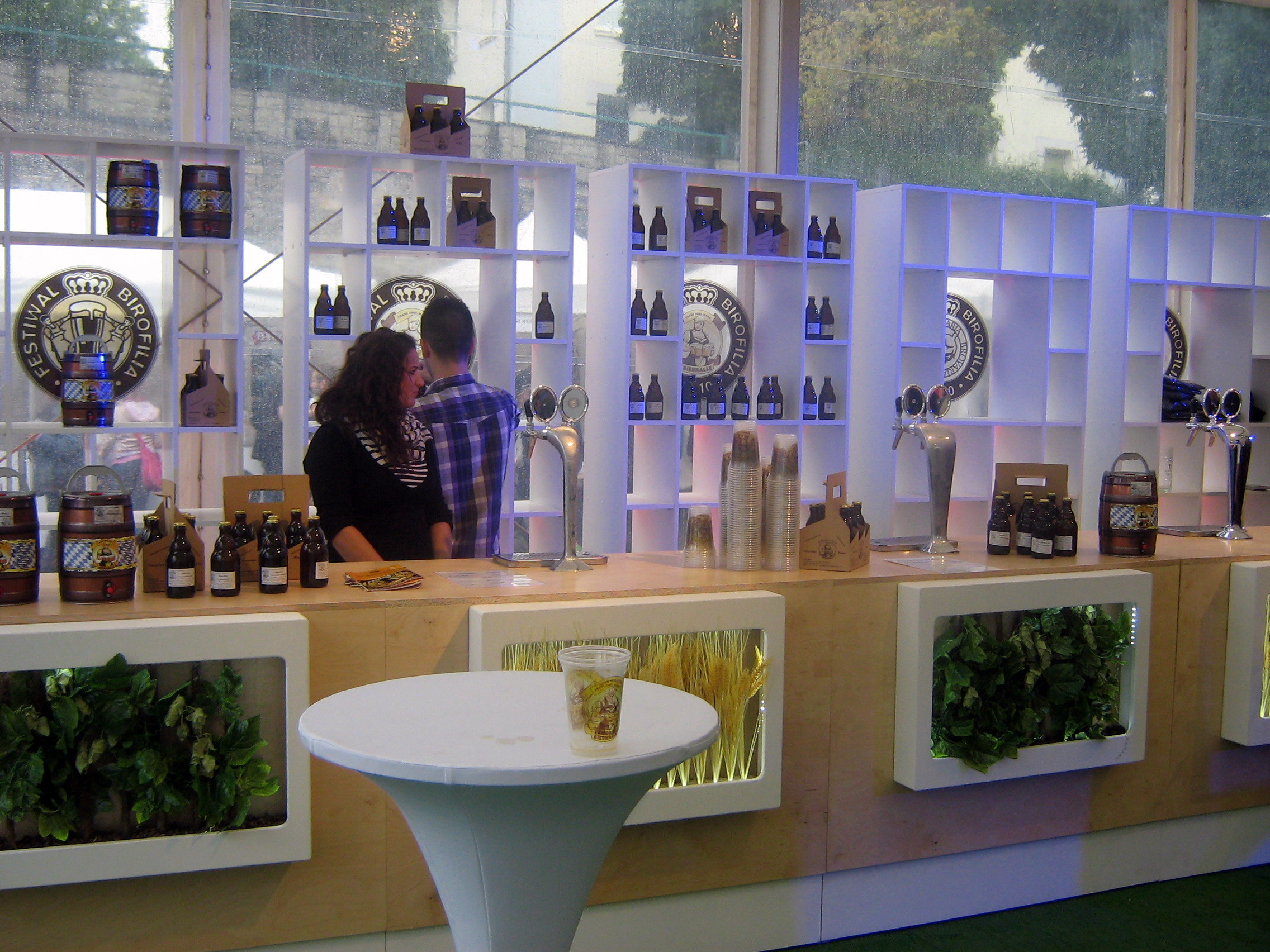 Swoje piwo prezentują browary restauracyjne